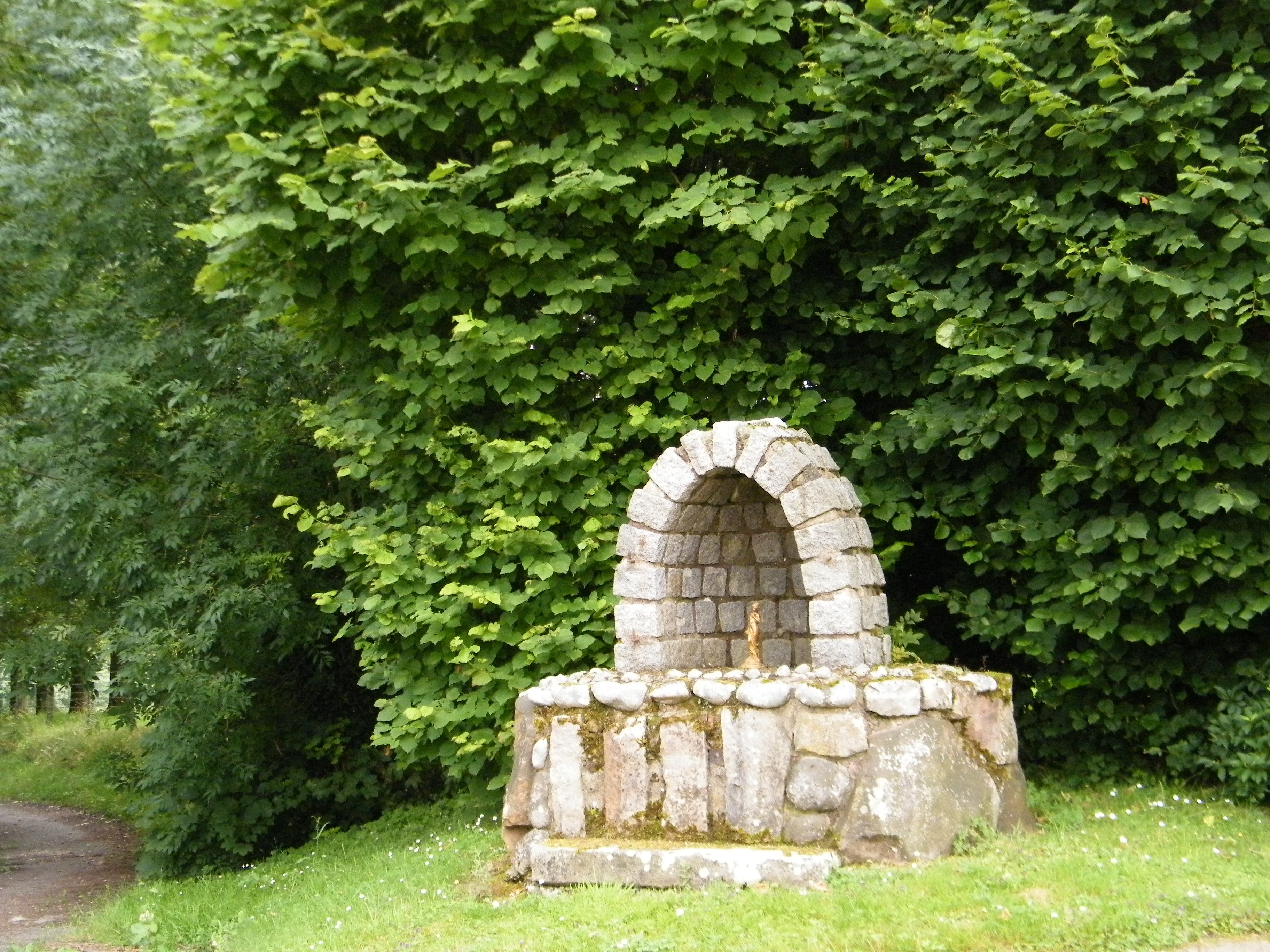 En sortie de Vacquerie